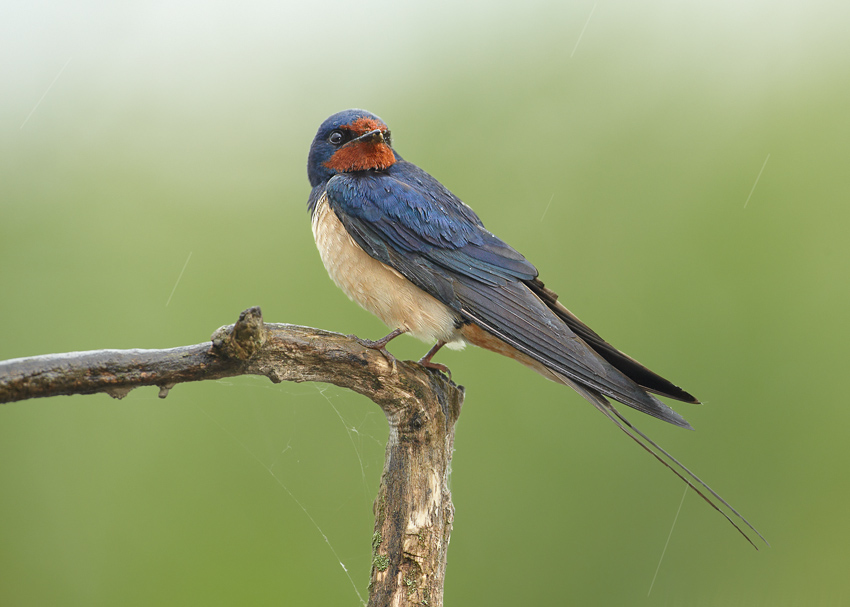 Hirundo rustica, Lednický areál, Czech Republic